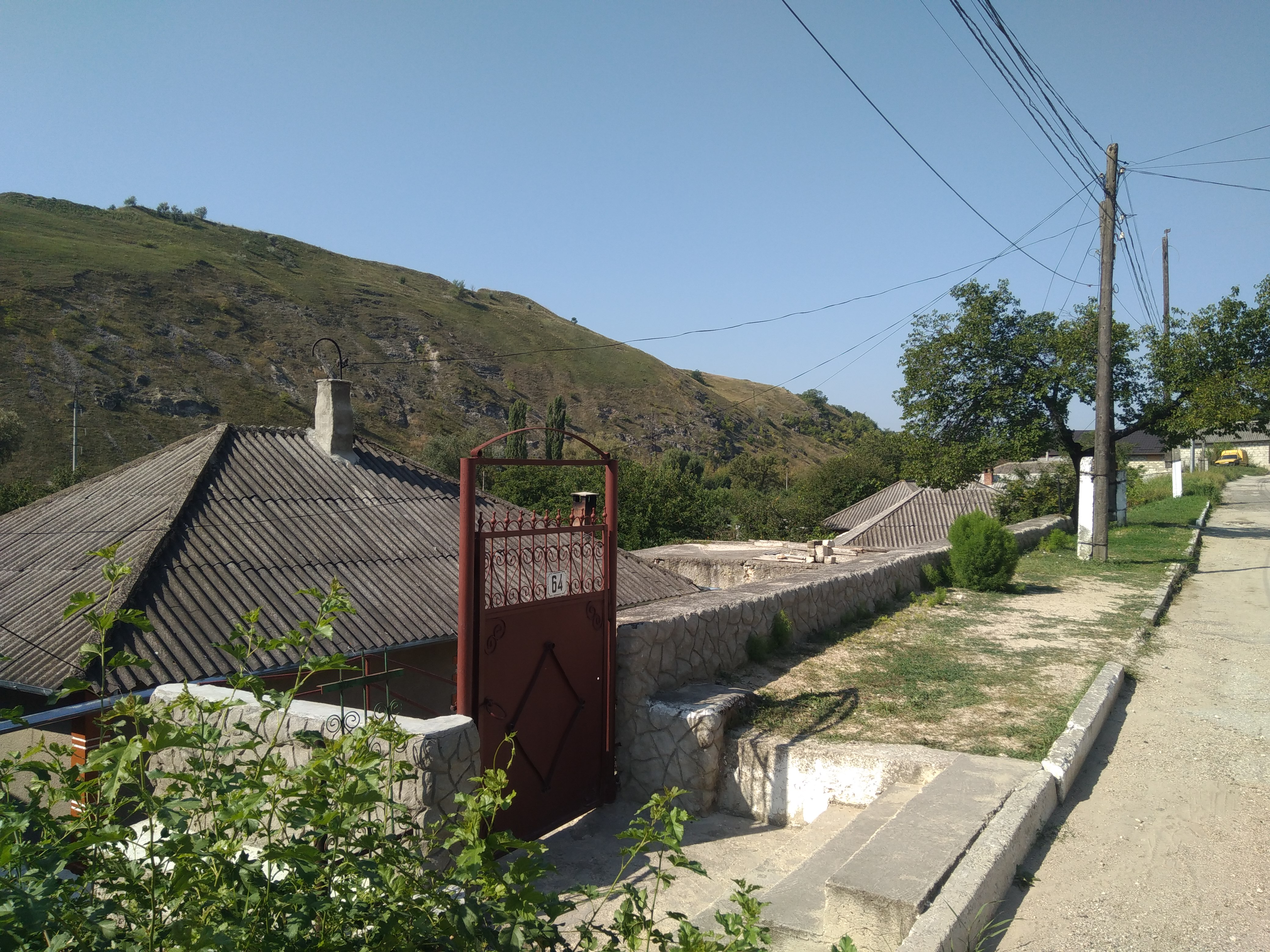 Defileul Orhei, monument al naturii amplasat în raionul Orhei, orașul Orhei (cod MD-OR-mn.A-055) A-055